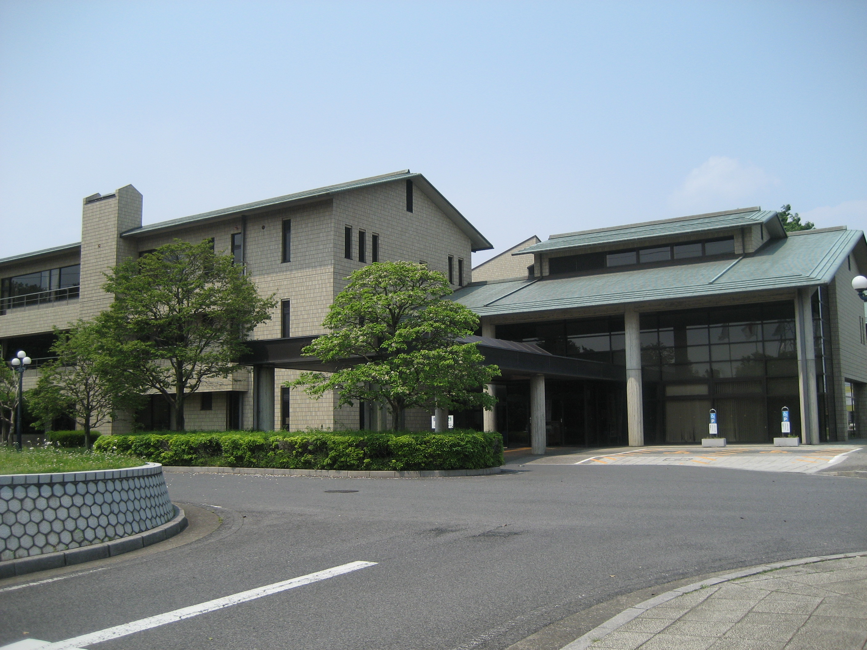 埼玉県蓮田市役所庁舎